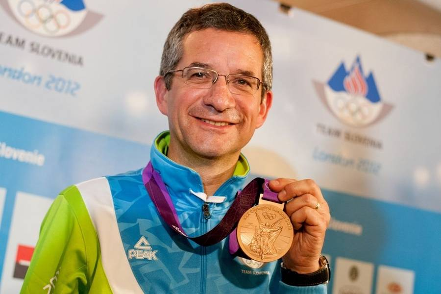 Rajmond Debevec